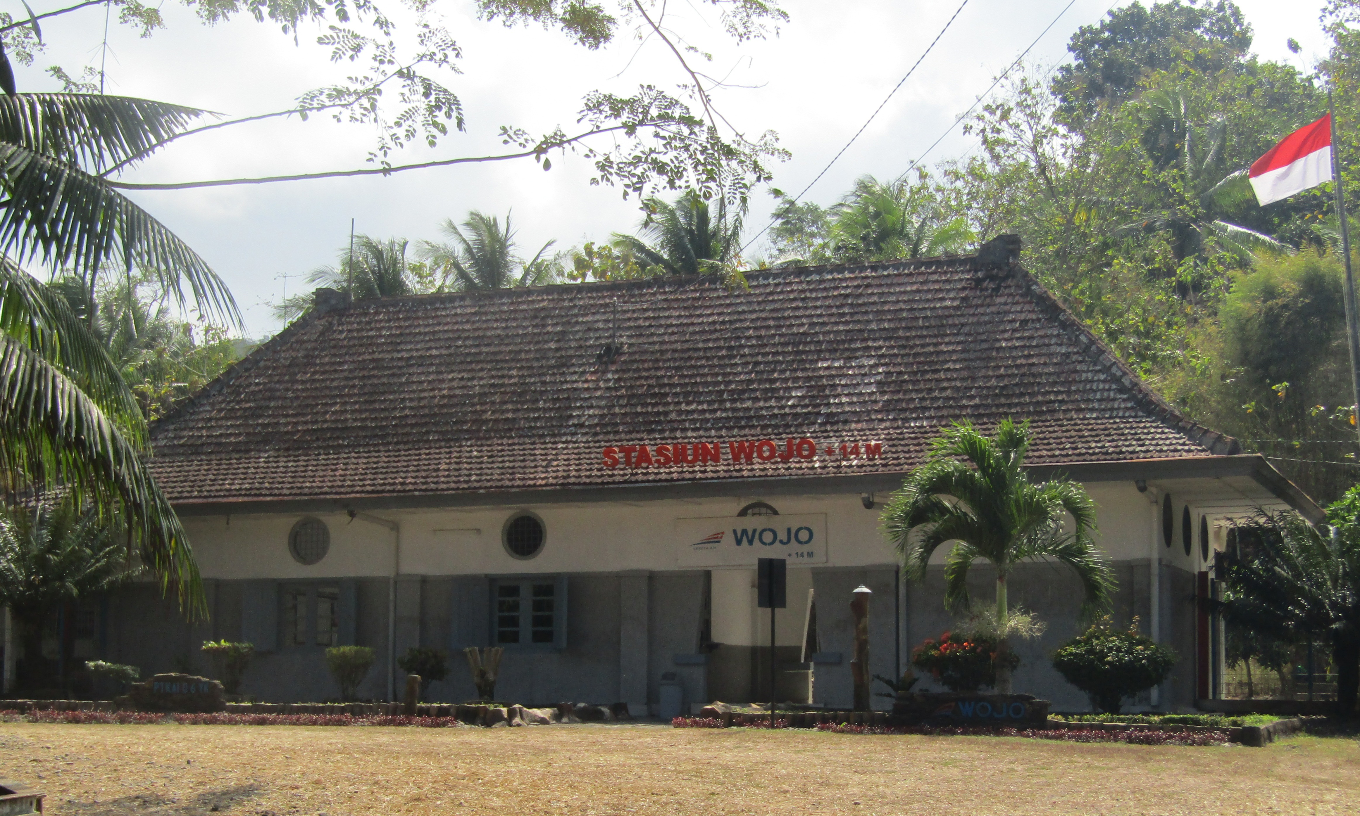 Bangunan utama Stasiun Wojo, 2018